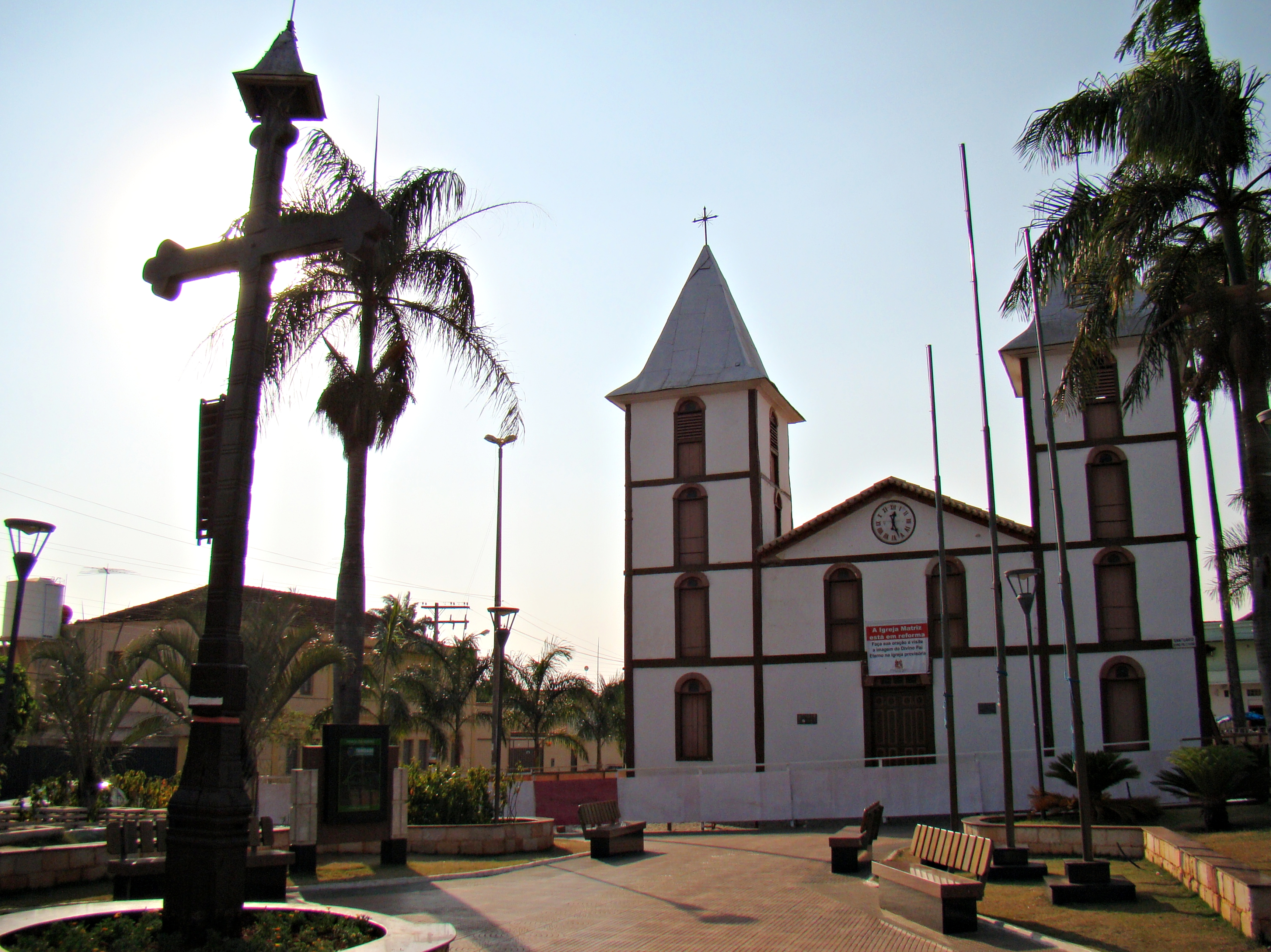 Santuário Velho - Divino Pai Eterno - Trindade - Goiás - Brasil